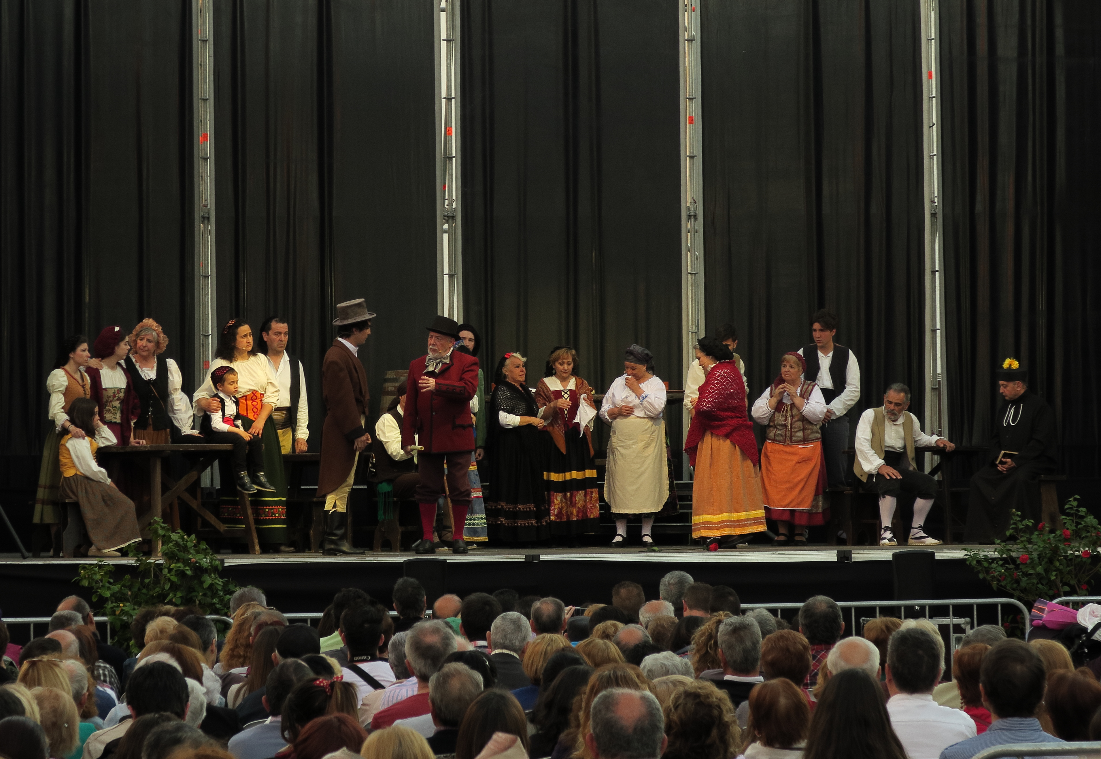 Representación teatral popular del Levantamiento del Dos de Mayo de 1808 en Móstoles (2016), 1